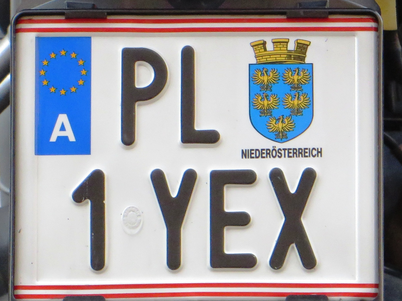 Motorrad-Kennzeichen, Bezirk St. Pölten, Niederösterreich